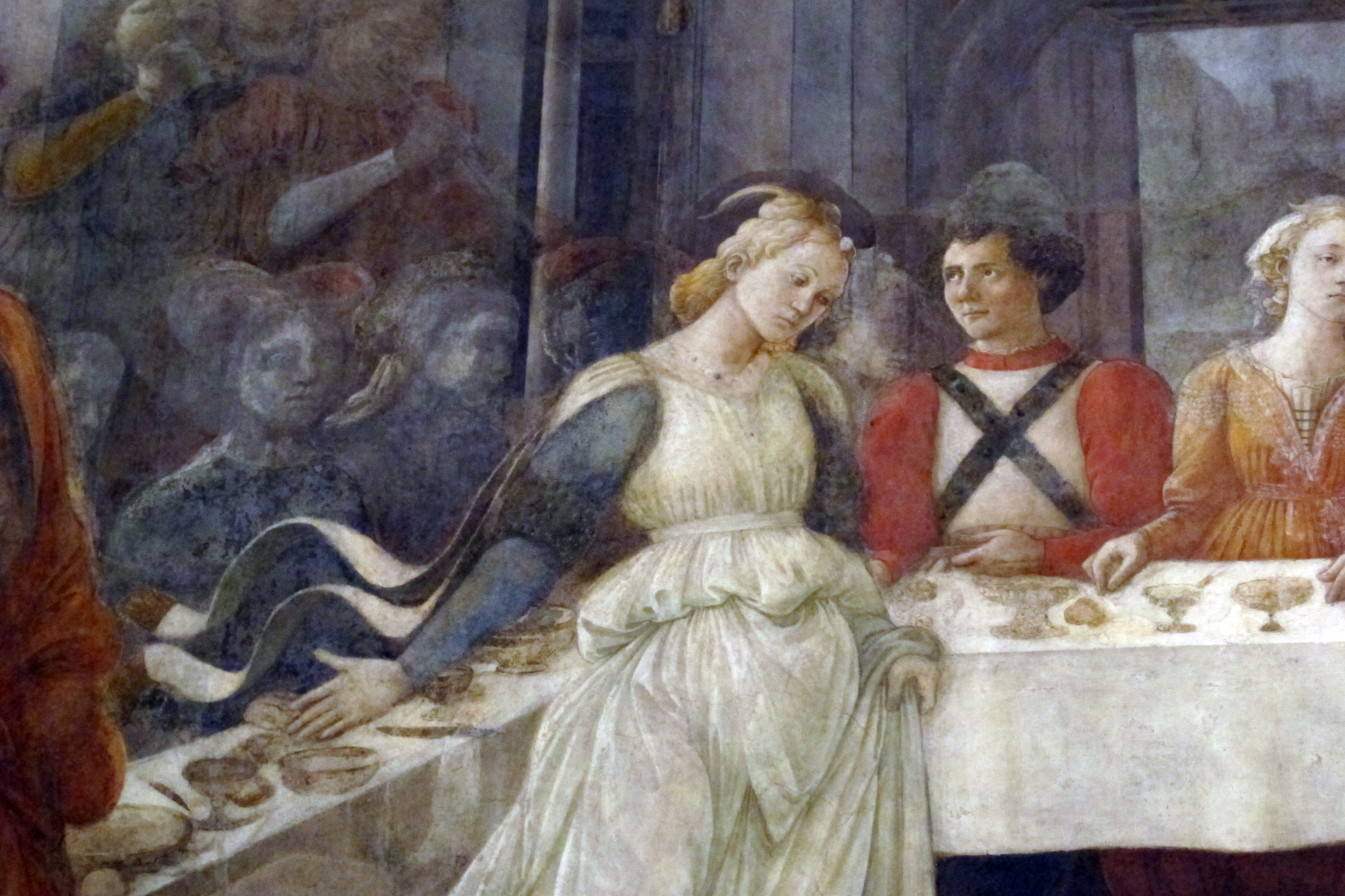 Duomo di Prato